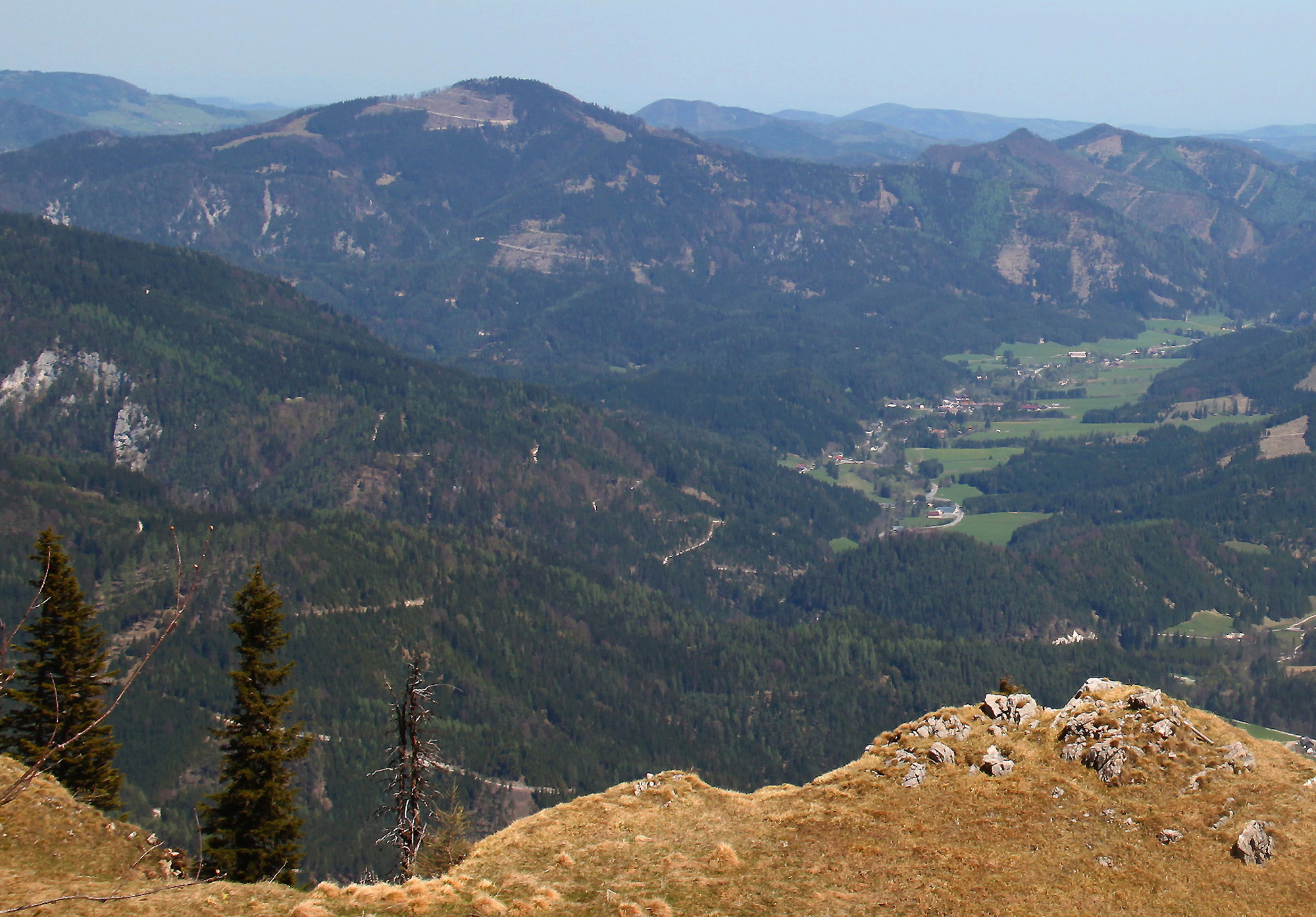 Blick zur Jochart von Südsüdwesten (Obersberg)